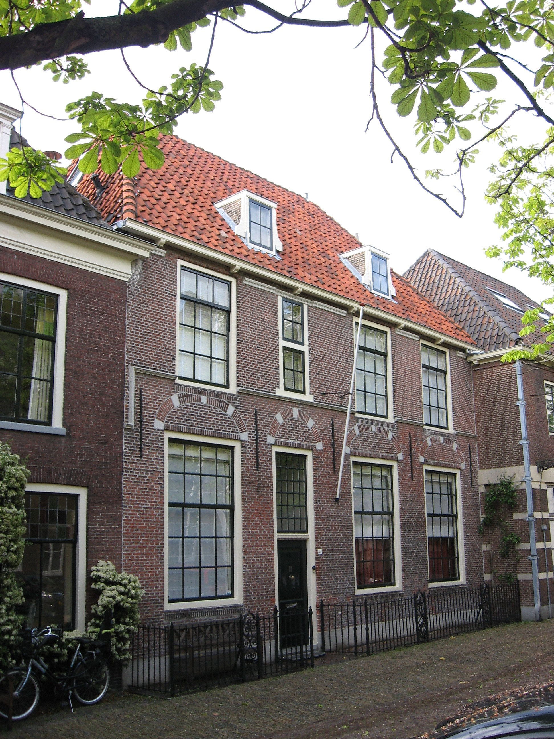 Delft - Bagijnhof 114.jpg, rijksmonument